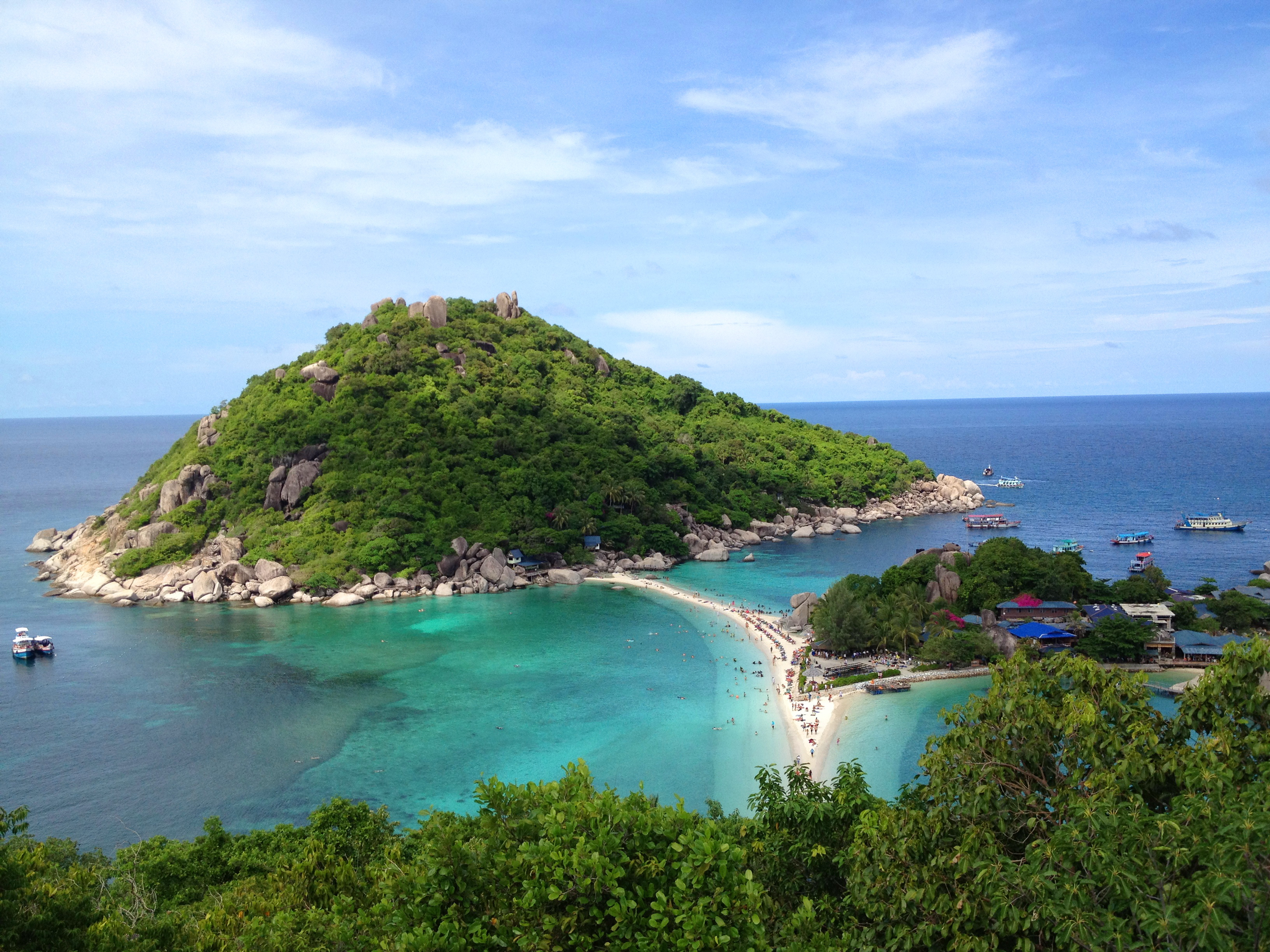 Ко Тао